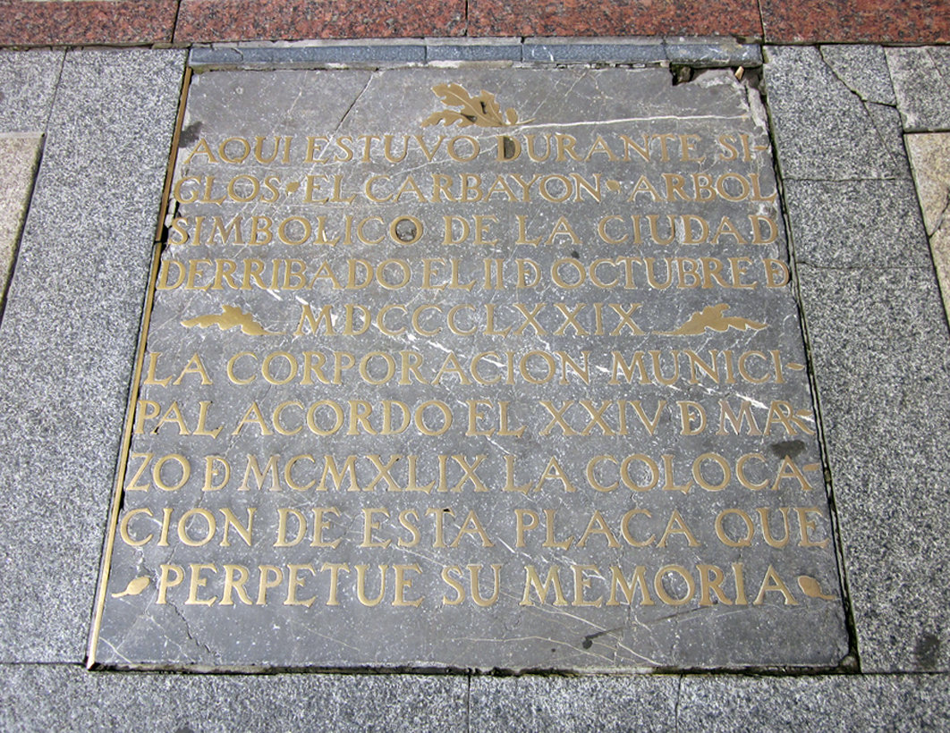 En ese lugar estuvo un roble monumental, tanto por su significado como por su tamaño, el Carbayón, que dio nombre a los ovetenses.